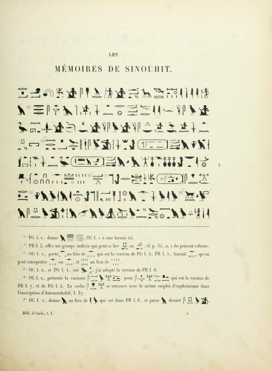 Hieroglyphische Transkription der Geschichte von Sinuhe, einem altägyptischen Literaturwerk